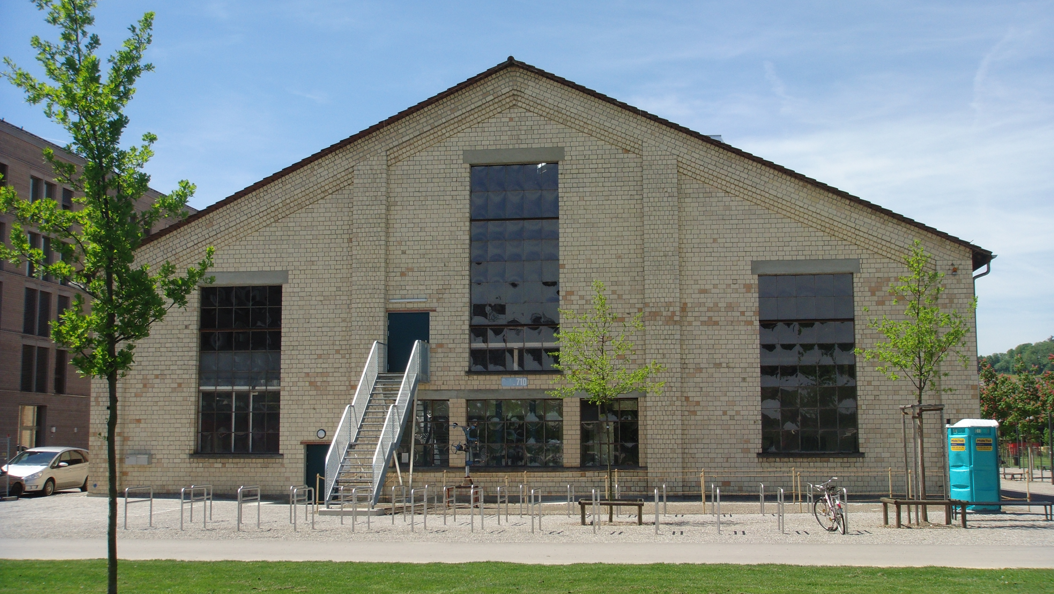 Die ehemalige Sulzer-Industriehalle 710 wird heute als Veranstaltungshalle genutzt.